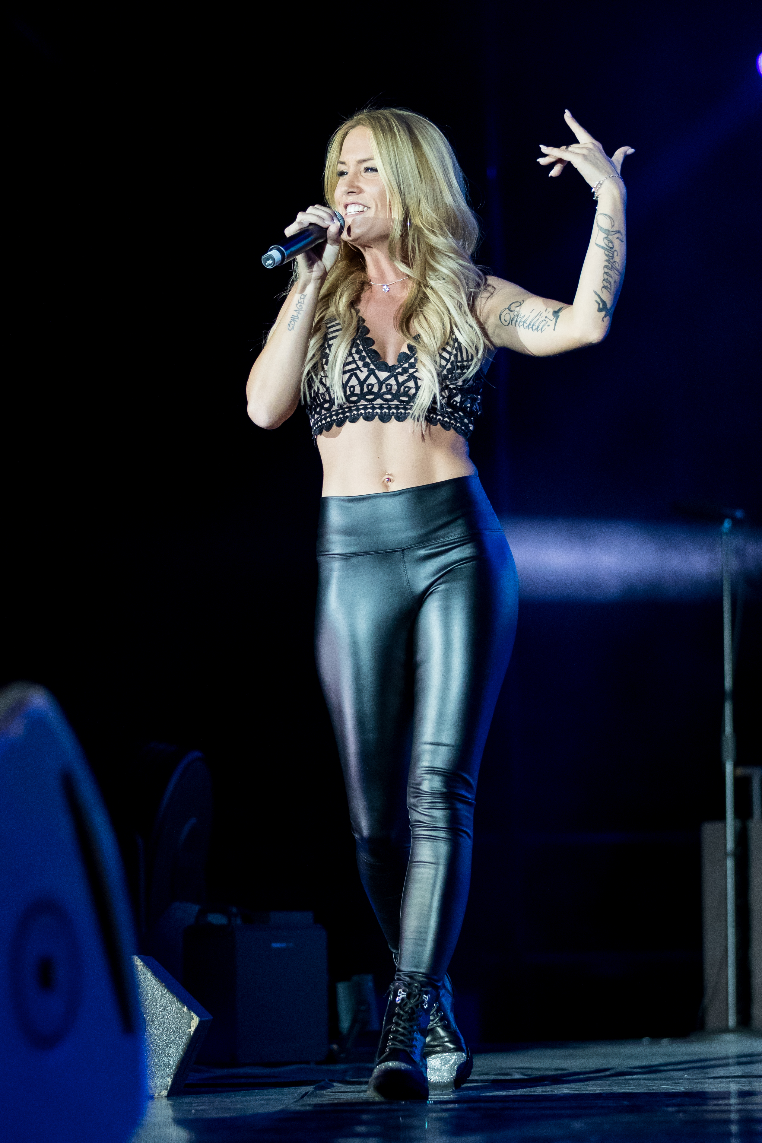 Sonia Liebing during Die Schlagernacht des Jahres at Hanns-Martin-Schleyer-Halle, Stuttgart, Baden-Württemberg, Germany on 2018-10-13, Photo